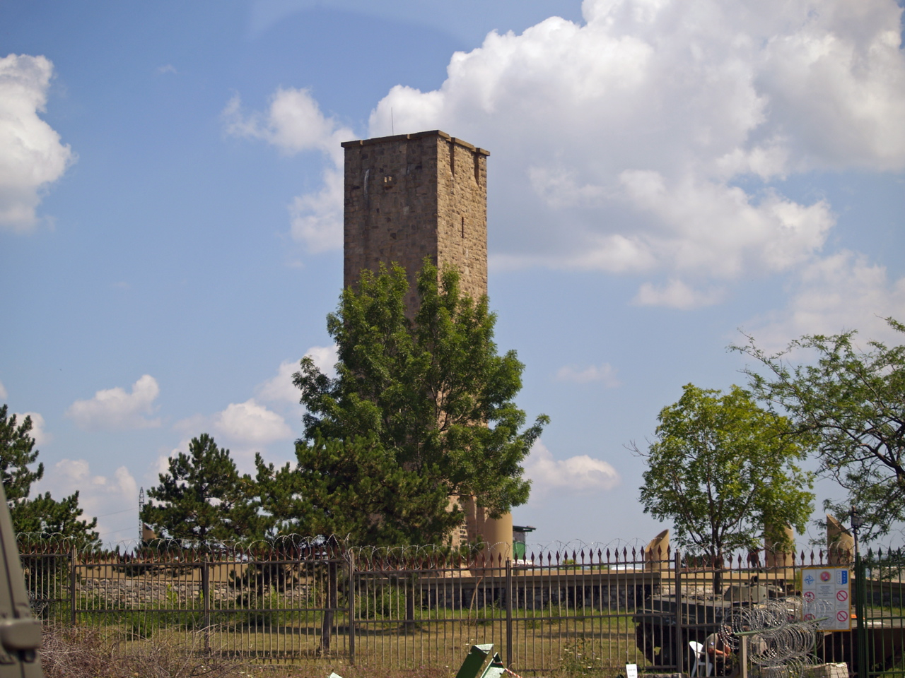 Polje Kosovo